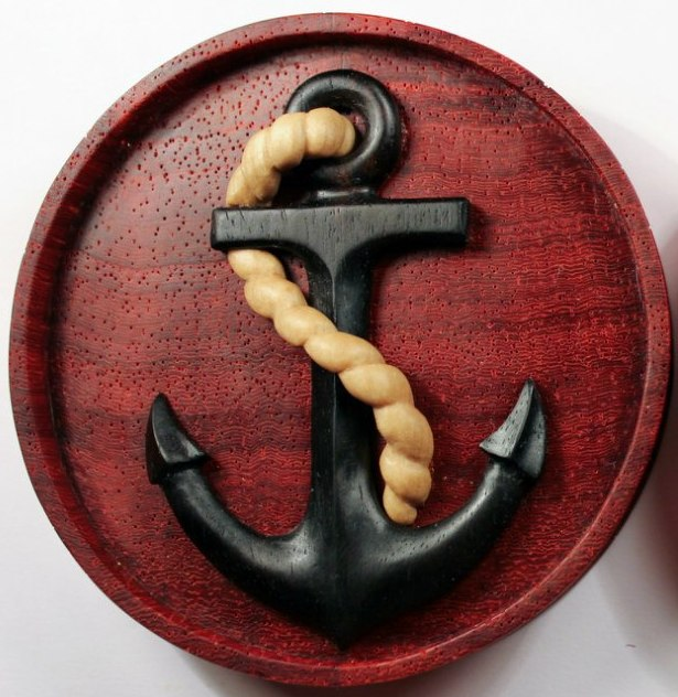 Плаг. Материал дерево.